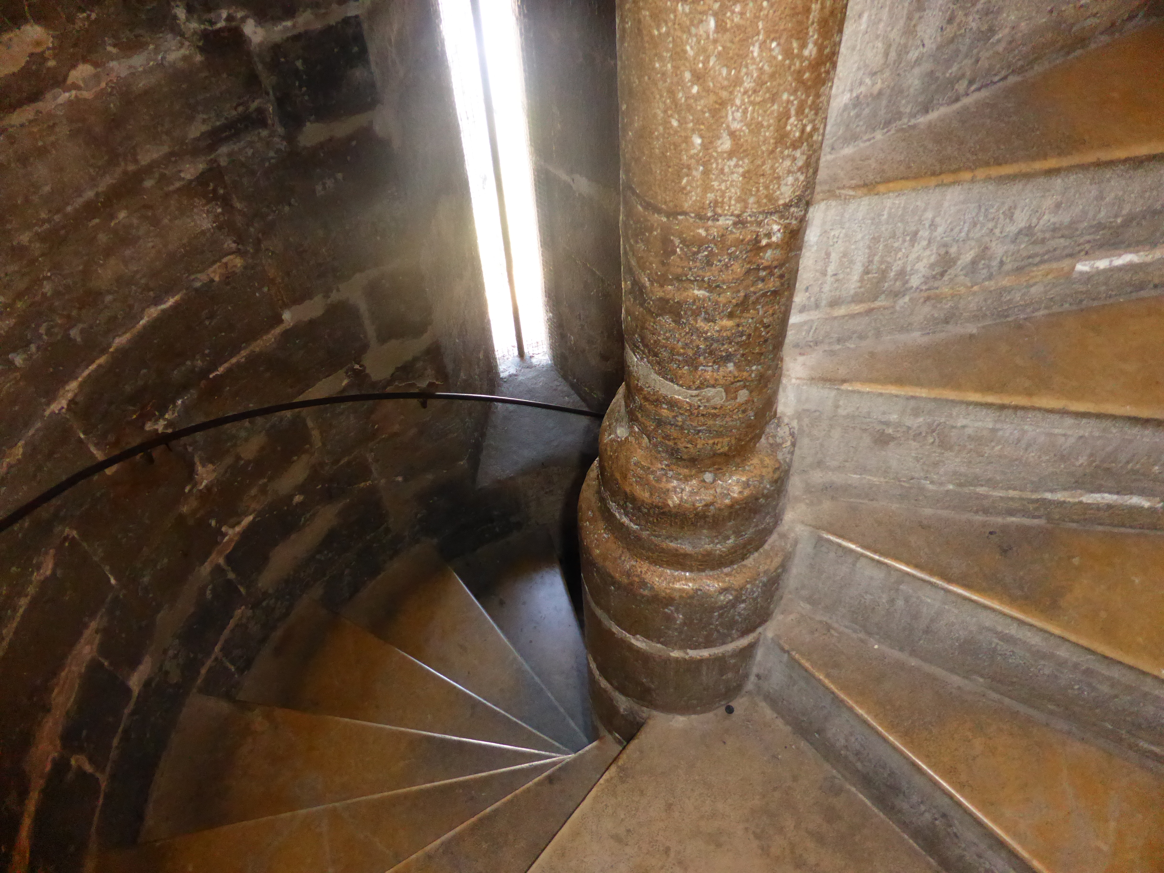 Escalera de caracol, de piedra, medieval, de época gótica (siglos XIV y XV), para subir a lo alto de la torre del Miguelete o Micalet, en la catedral de la ciudad de Valencia, España. Para ascender a una altura de 51 metros, hay que subir 207 escalones.